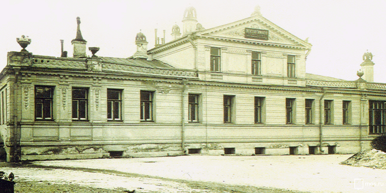 Дом на Плющихе 11, в котором Лев Толстой останавливался в своей первый приезд в Москву